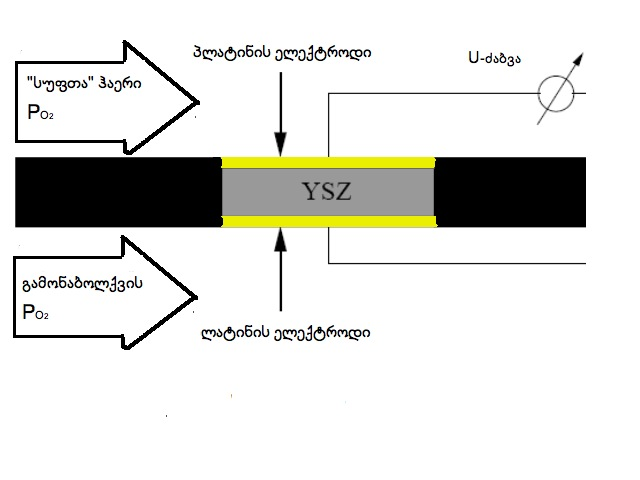 ნახაზზე ნათლად ჩანს 3-ფაზა-კონტაქტები, პირველი: ჰაერი/პლატინის ელექტროდი/YSZ(მყარი ელექტროლიტი). ასევე მეორე მხარეს: გამონაბოლქვი(გაზი)/პლატინის ელექტროდი/YSZ(მყარი ელექტროლიტი)